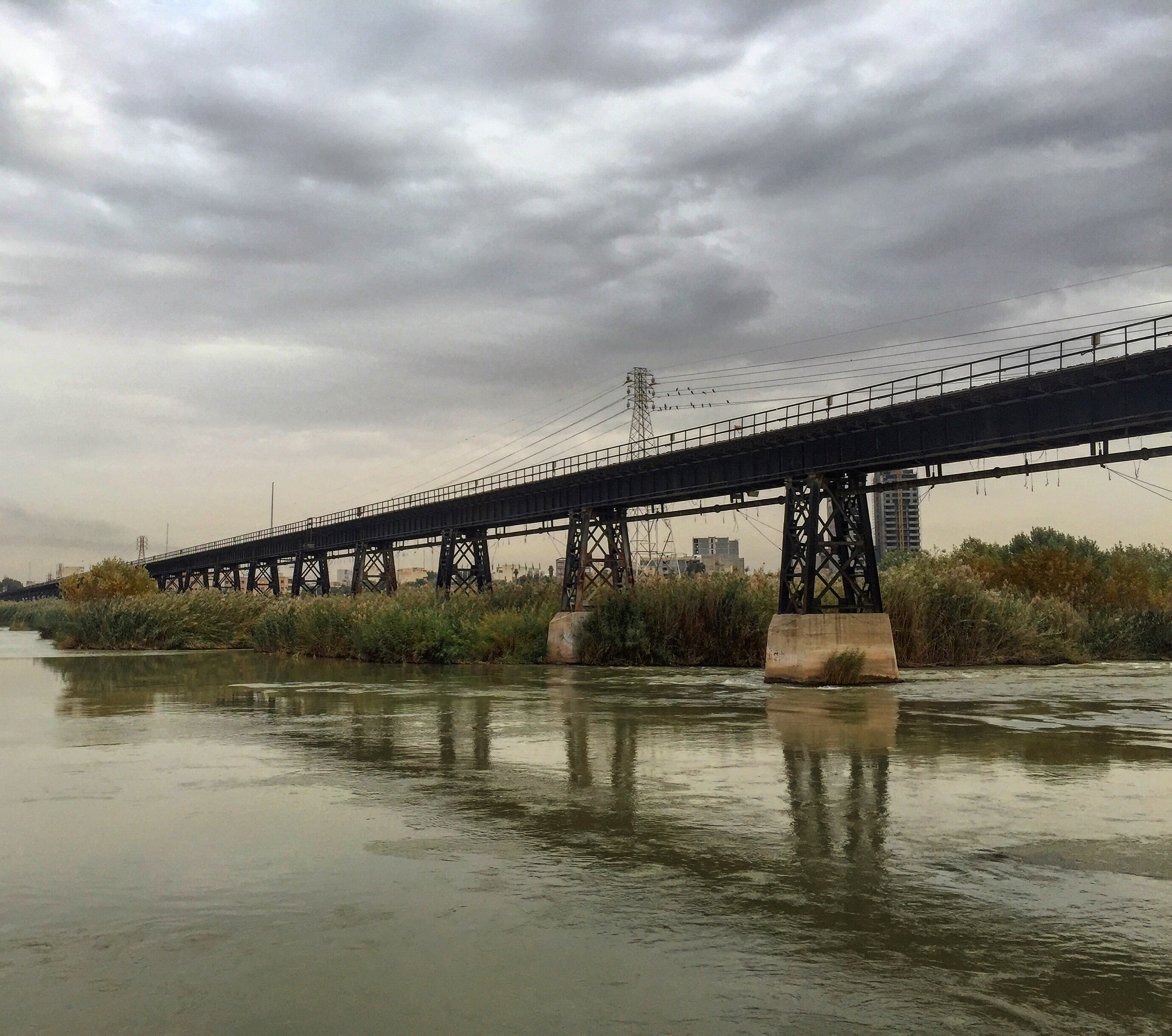 پل سیاه/ پل فلزی راه آهن